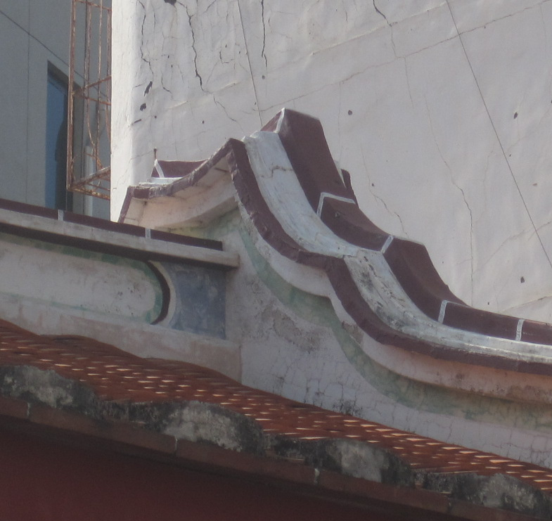 鄭成功祖廟三川殿山牆，五行屬火